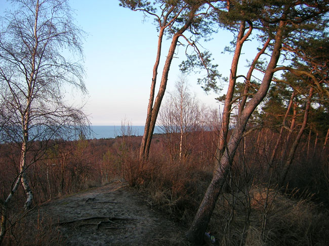 Borový les u břehu Baltského moře kdesi poblíž města Krynica Morska, Polsko